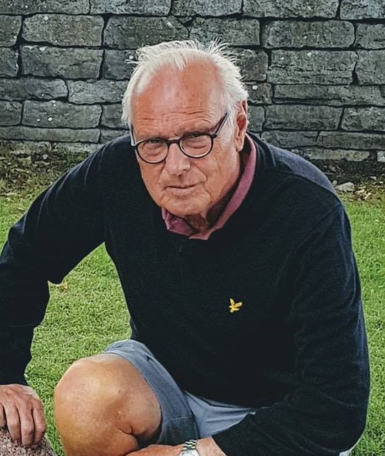 Mats Pettersson - Gotland 2018